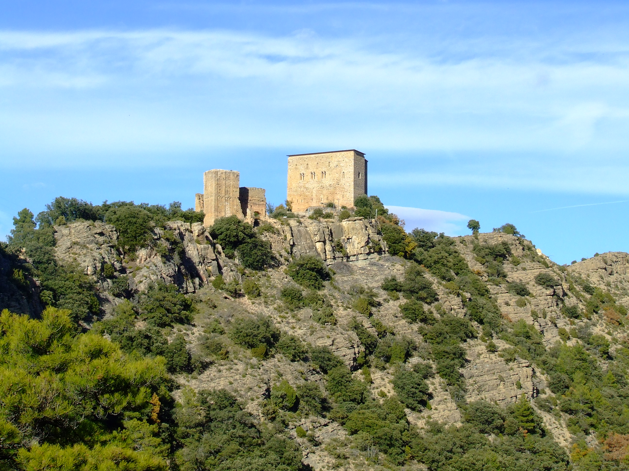 El Castell de Llordà des de Biscarri (llevant).